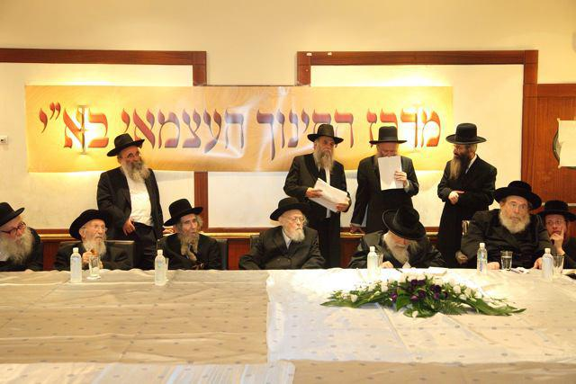 תמונת המזרח בכינוס מועצות גדולי התורה של אגודת ישראל, דגל התורה ומועצת אגודת ישראל באמריקה לצורך הקמת עמותת החנוך העצמאי החדשה